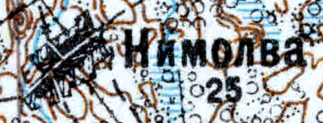 Топографическая карта Ленинградской области, квадрат VIc-28 (Луга), деревня Немолва